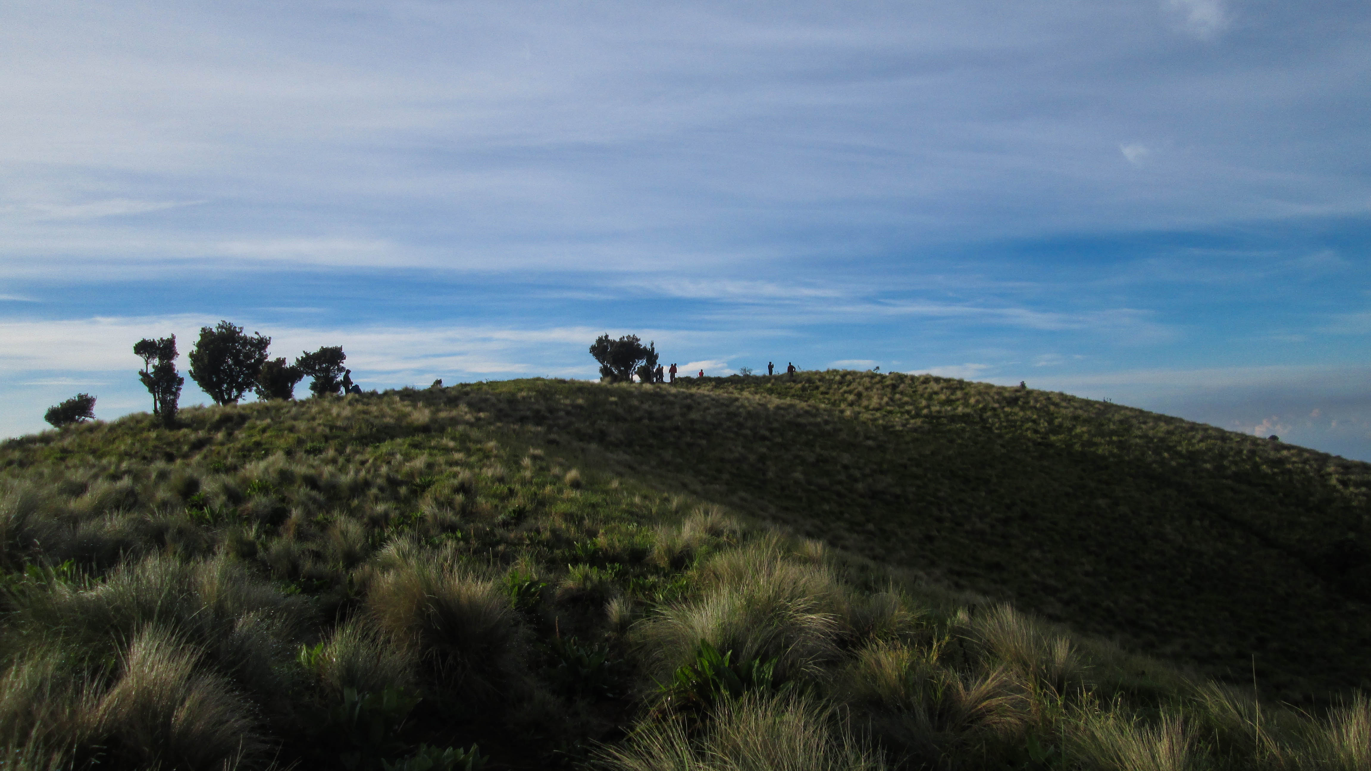 Padang sabana menjadi salah satu alasan ramainya pengunjung di Taman Nasional Gunung Merbabu, namun ramainya pengunjung juga berimbas pada erosi yang terjadi di sepanjang jalur pendakian Selo.